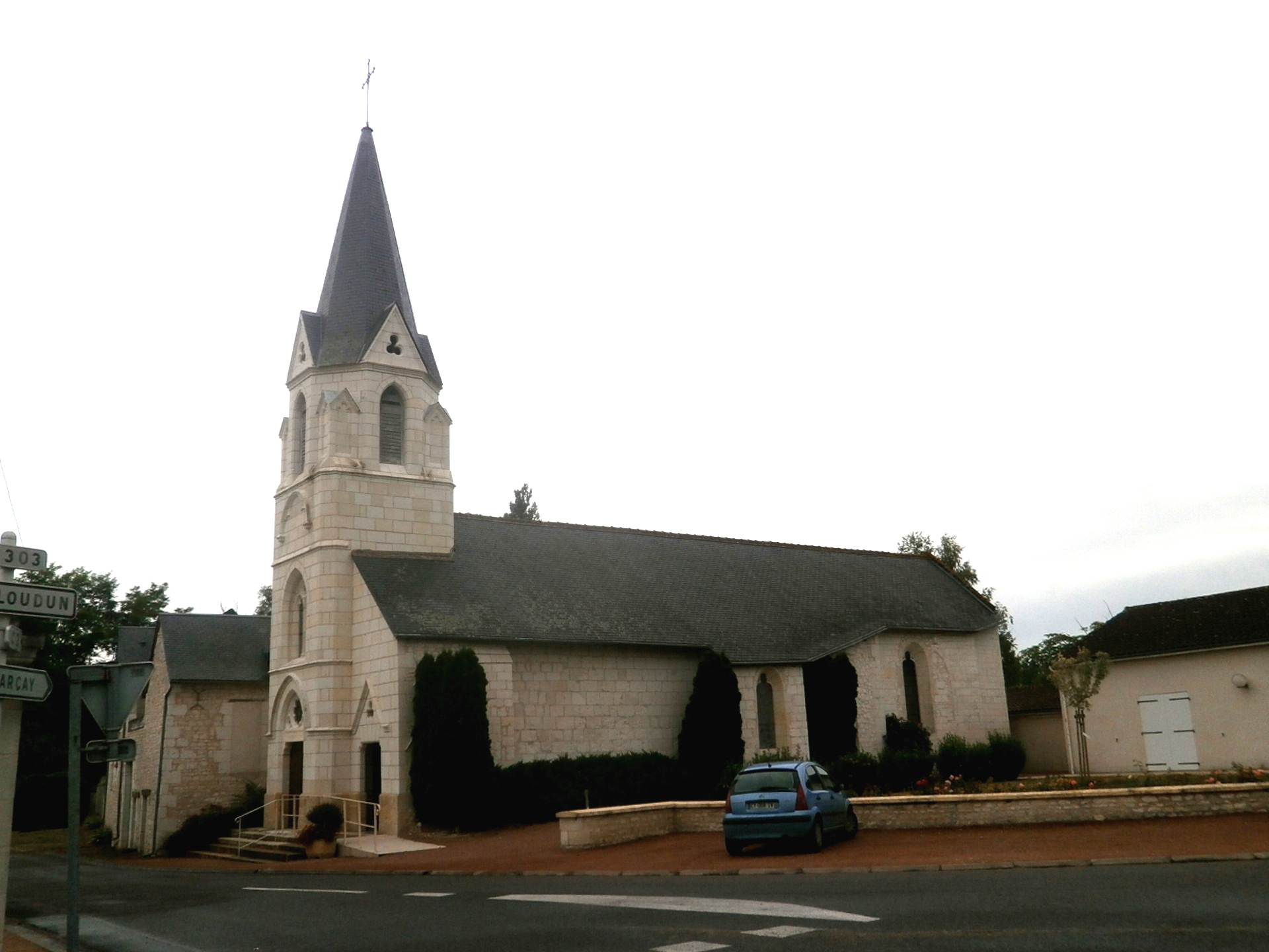 L'église.